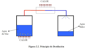 Gatzgabetze sistema bakuna.